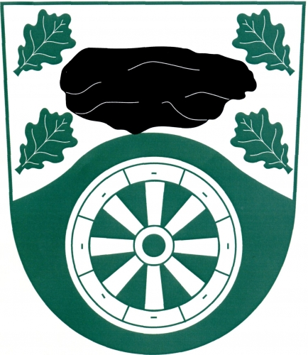 znak, Kadov, okres Strakonice